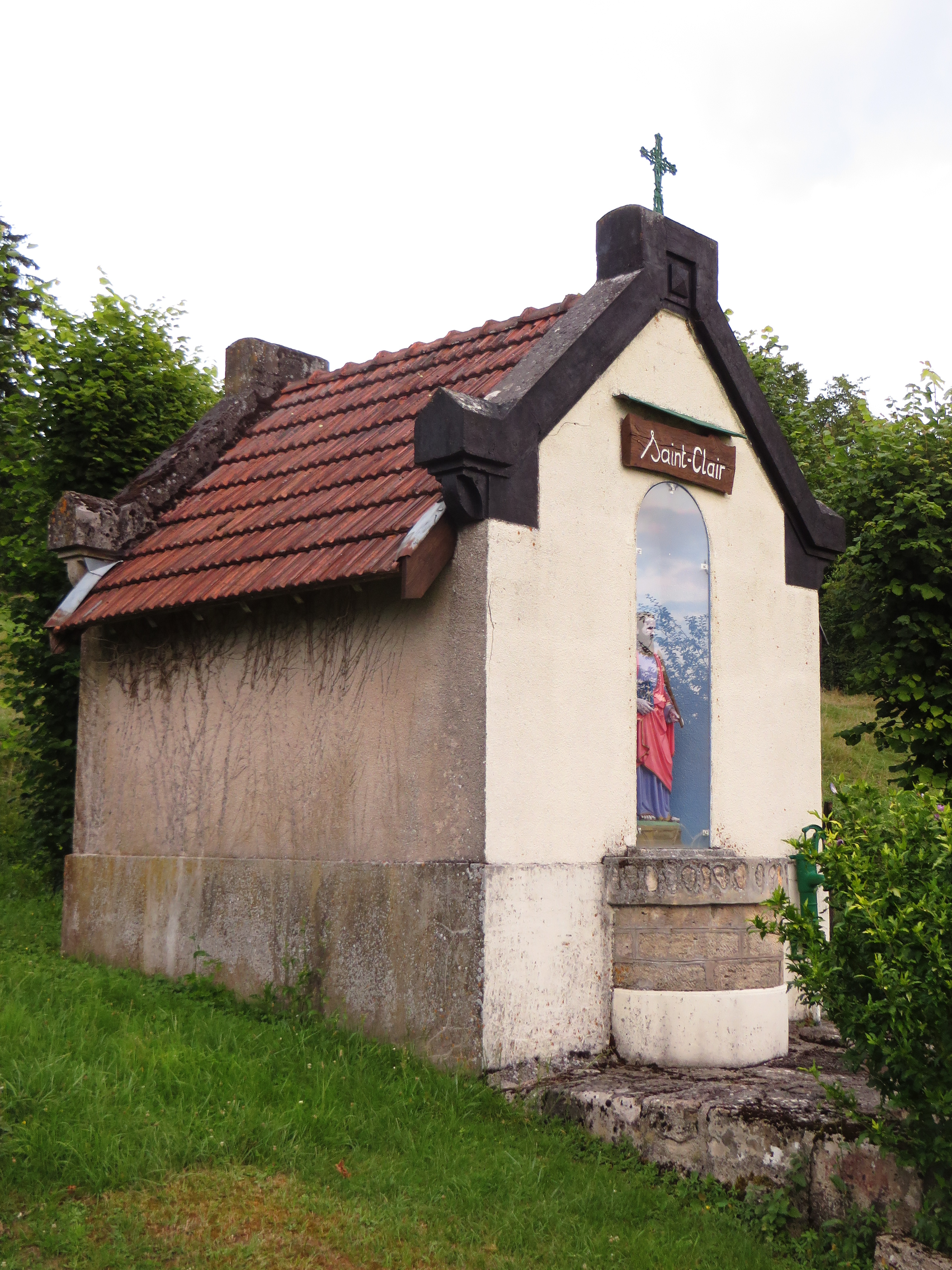 Fontaines-Saint-Clair Chapelle Saint-Clair